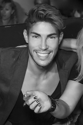 Jerome Kutscher 2013